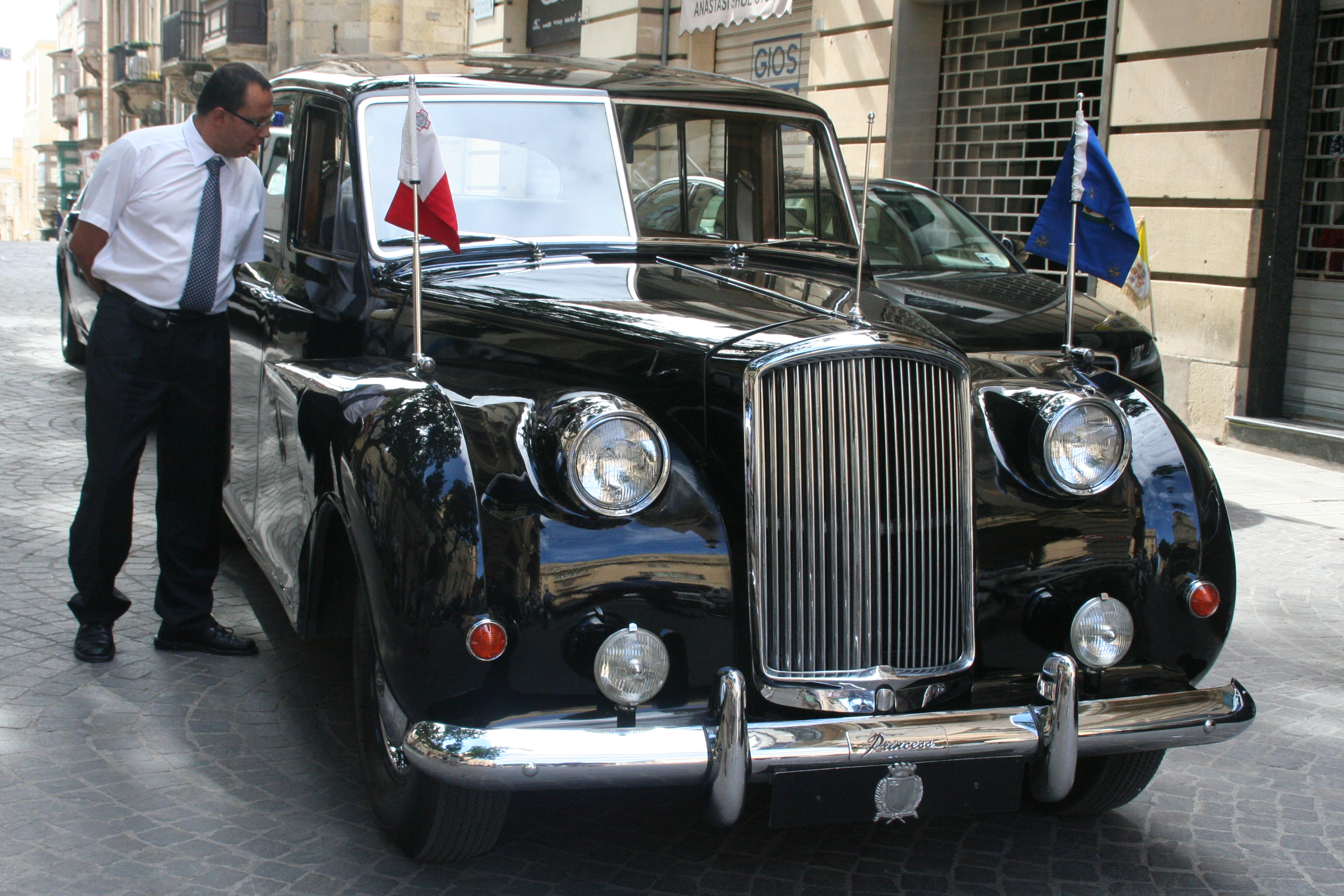 Voiture d'apparat Princess du président de la république de Malte et son chauffeur